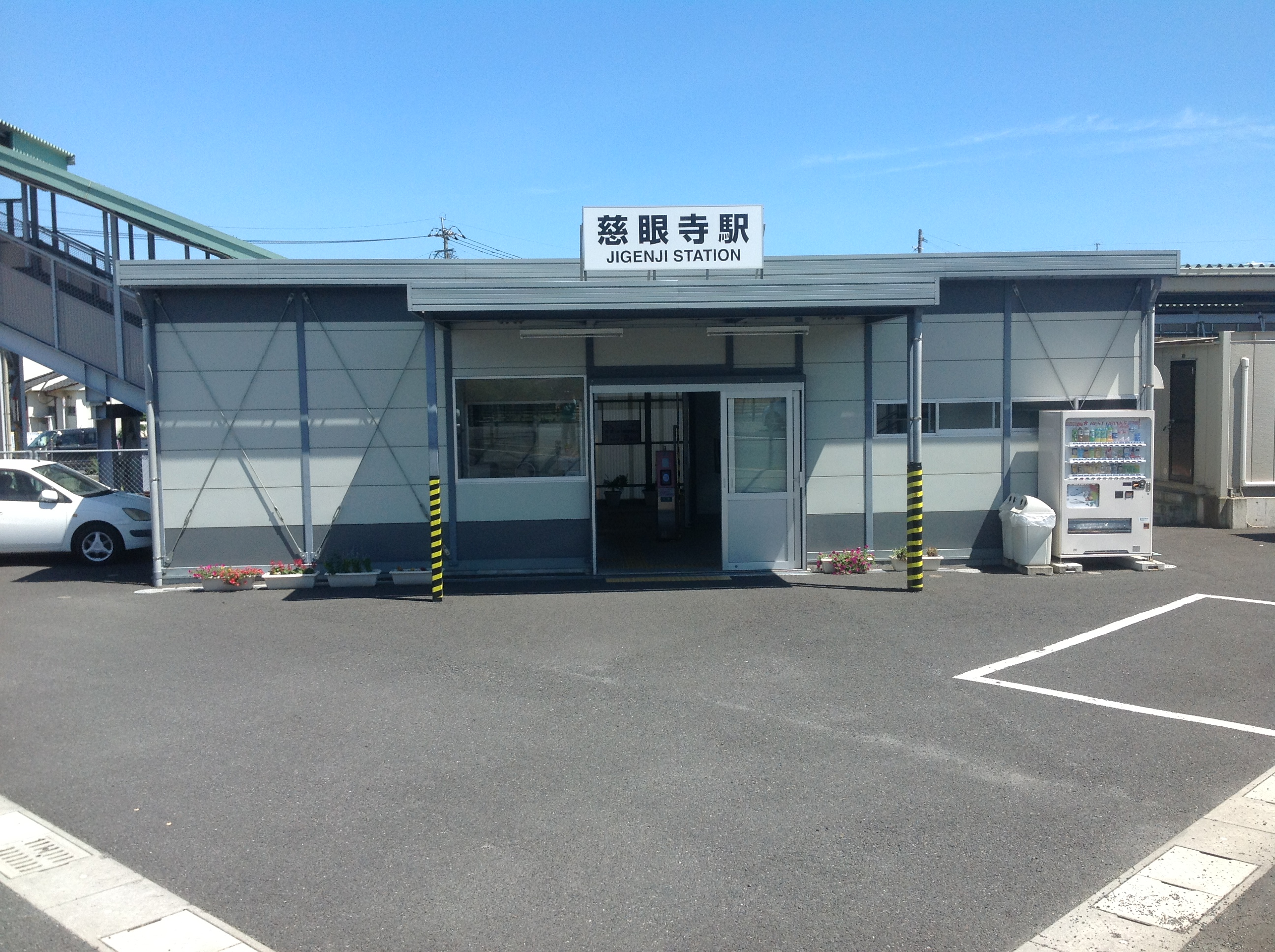 慈眼寺駅仮駅舎